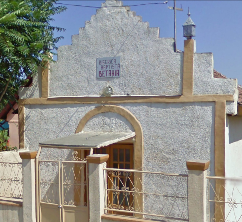 Biserica Baptista Betania Arad